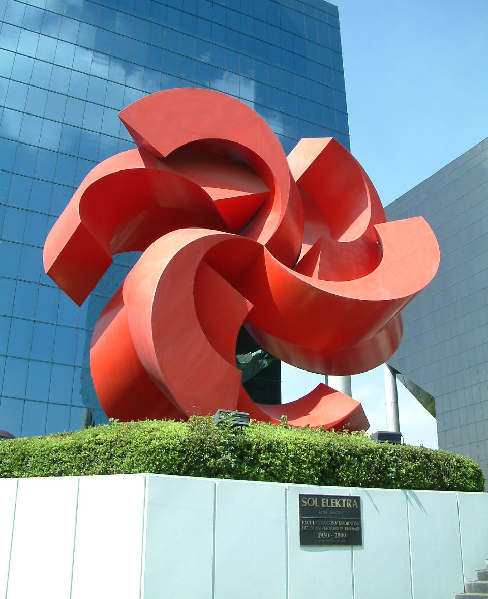 Escultura del Sol Elektra del escultur Sebastian. Ésta escultura se encuentra dentro del complejo corporativo "Parque Cuicuilco".